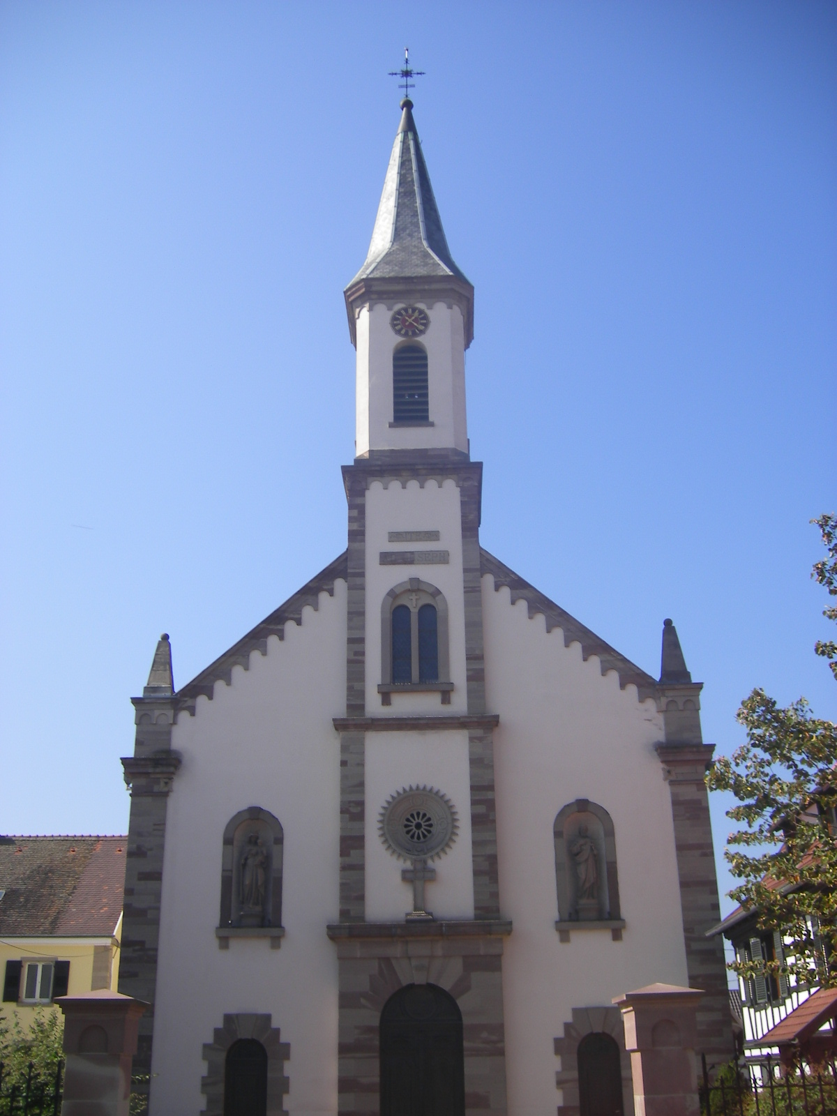 Hoenheim